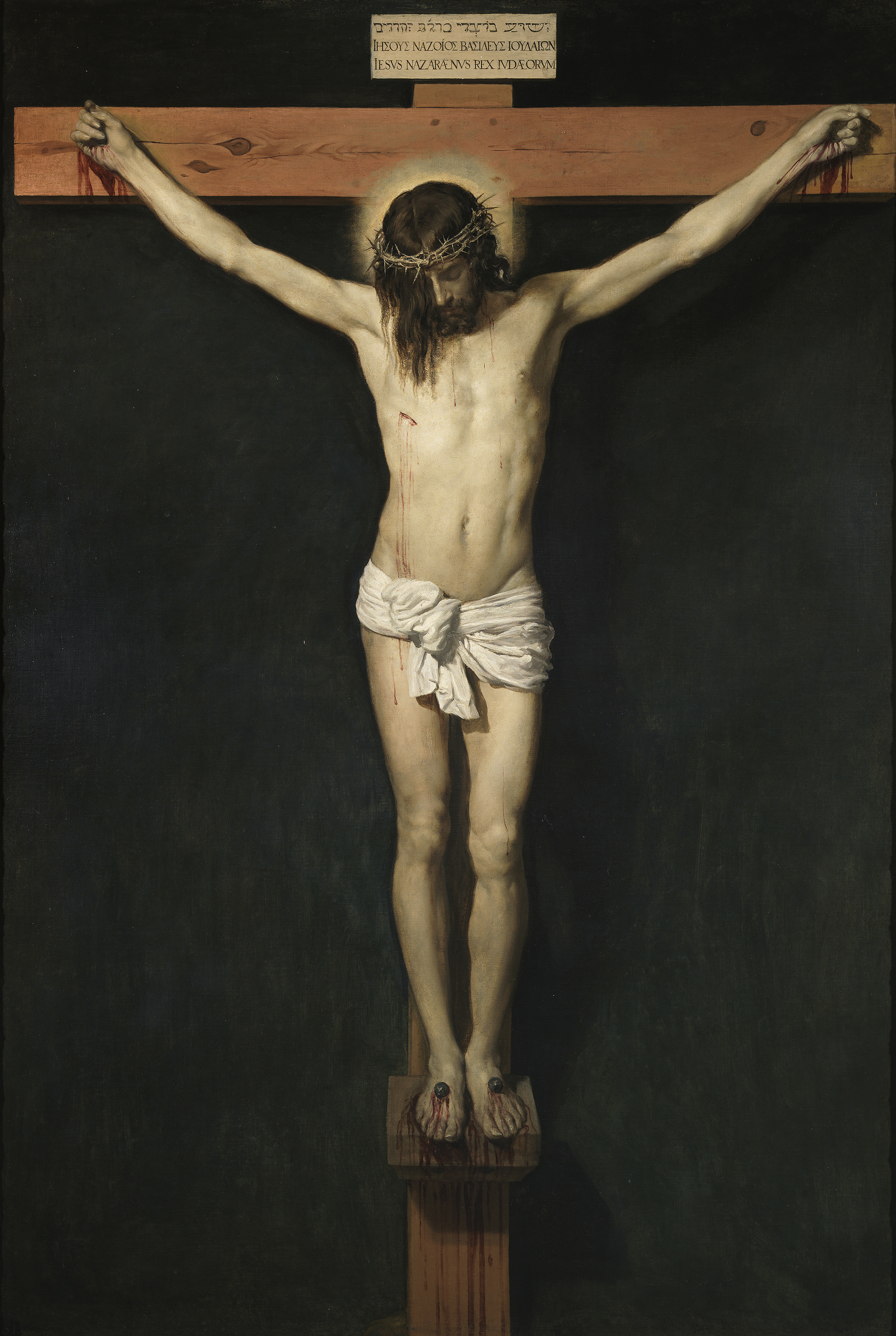 La obra representa a Jesucristo crucificado, y es una de las obras religiosas más conocidas del pintor sevillano Diego Velázquez.